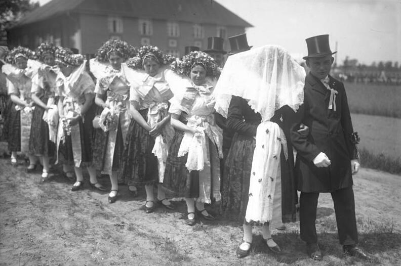 Wenden-Hochzeit im Spreewald! Ein wendischer Hochzeitszug mit dem Brautpaar an der Spitze, welcher heute noch nach alter Tradition ausgeübt wird.